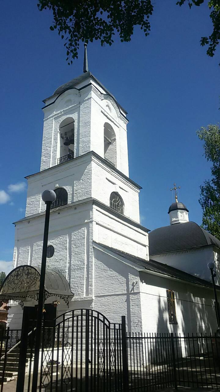 Церковь Иоанна Воина: улица Першутова, Ковров, Владимирская область